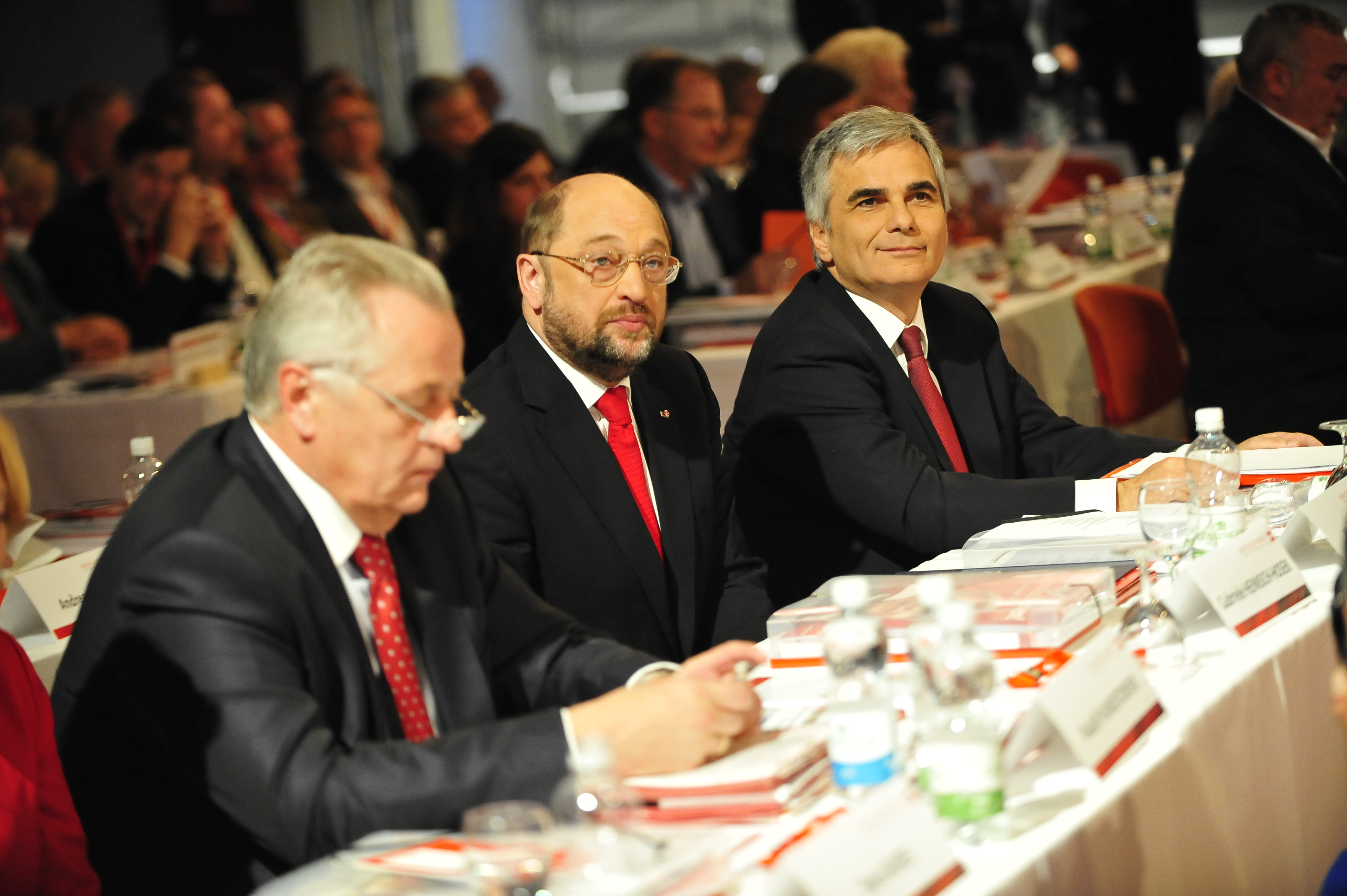 VAZ St. Pölten, 13.10.2012 Foto: Thomas Lehmann